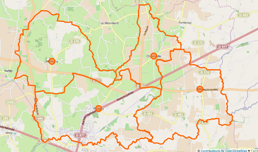 Carte de Grandparigny , commune nouvelle